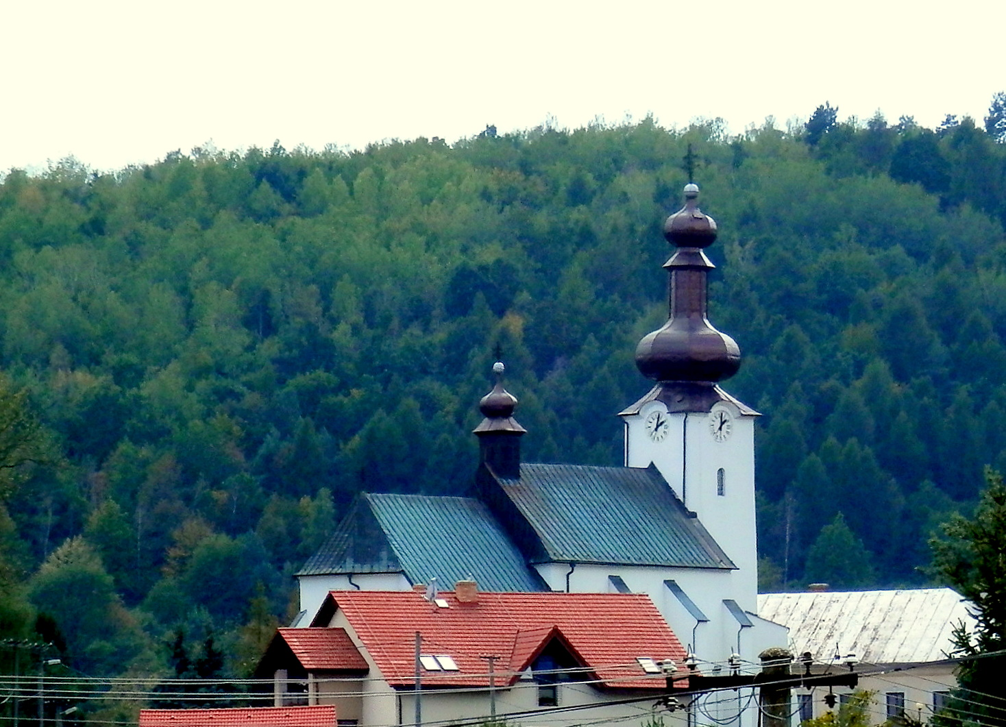 Kostol v obci Ražňany okres Sabinov.